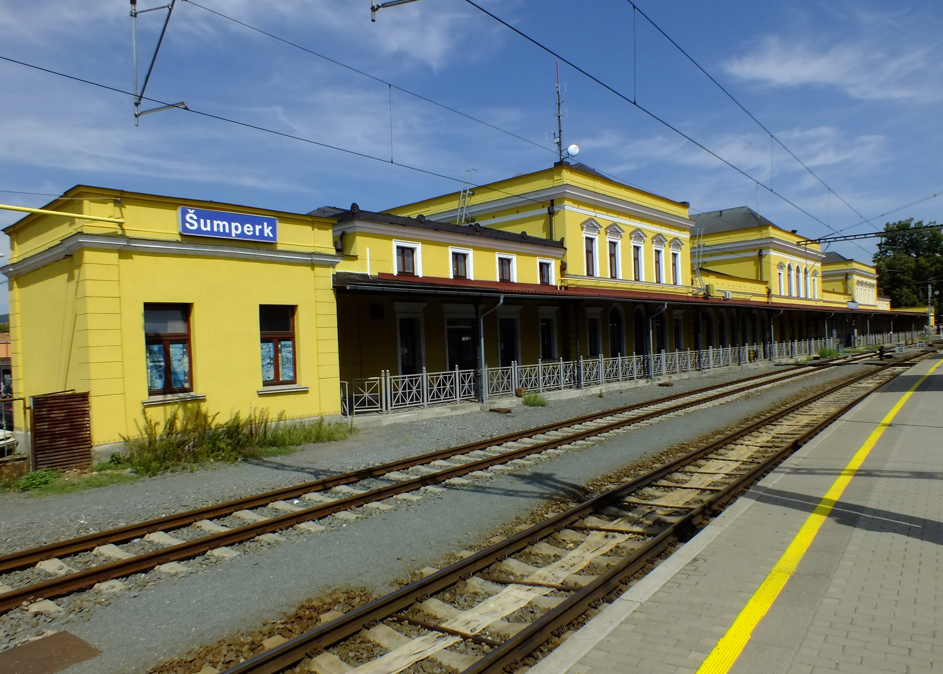 Staniční budova